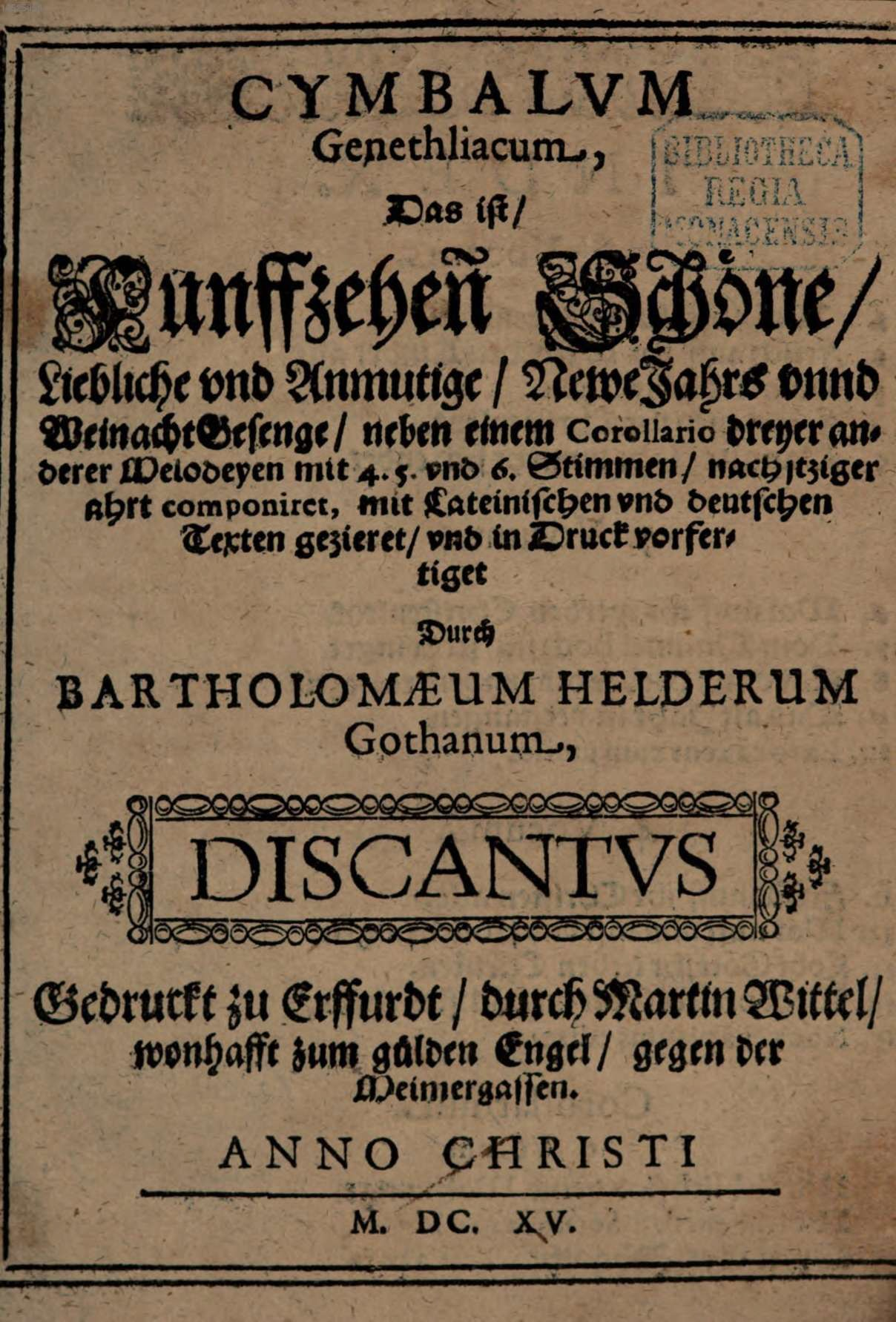 Bartholomäus Helder: CYMBALVM Genethliacum : Das ist / Funffzehen Schöne / Liebliche vnd Anmutige / Newe Jahrs vnnd Weinacht Gesenge / neben einem Corollario dreyer anderer Melodeyen mit 4. 5. vnd 6. Stimmen / nach itziger ahrt componiret, mit Lateinischen vnd deutschen texten gezieret / vnd in Druck vorfertiget. Erfurt 1615, Titelseite